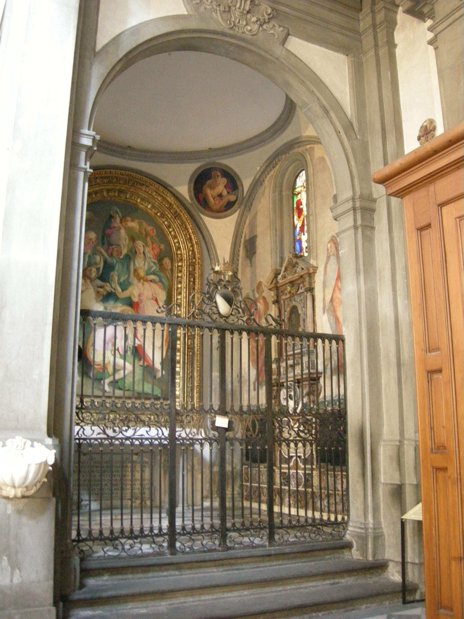 Cappella barbadori, architettura